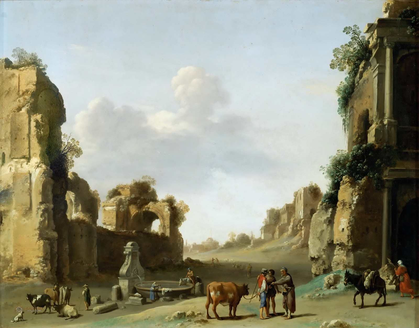 = Forum Romanum